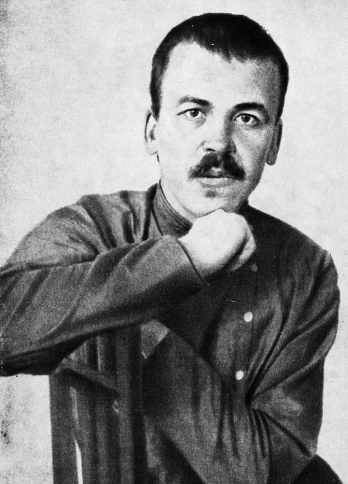 Артём Весёлый (Никола́й Ива́нович Кочку́ров; 1899—1938) — русский советский писатель.